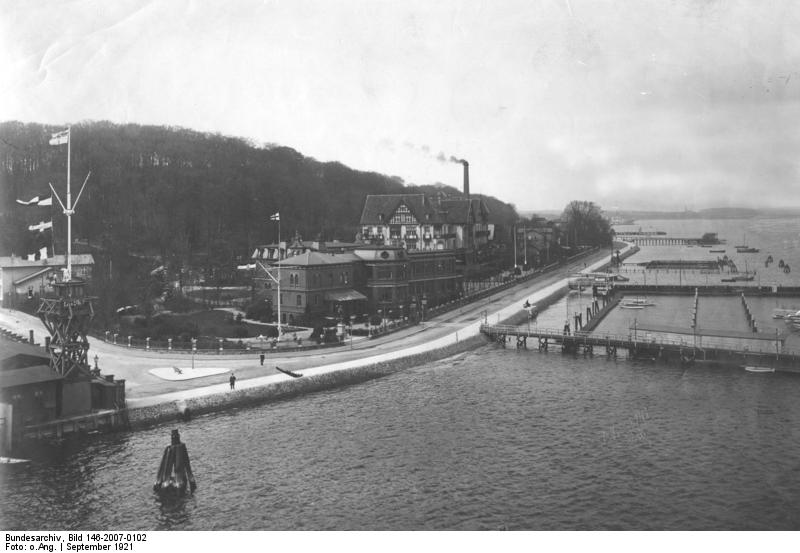 Kiel. Die Strandpromenade mit dem Gebäude des Kaiserl. Yacht Clubs